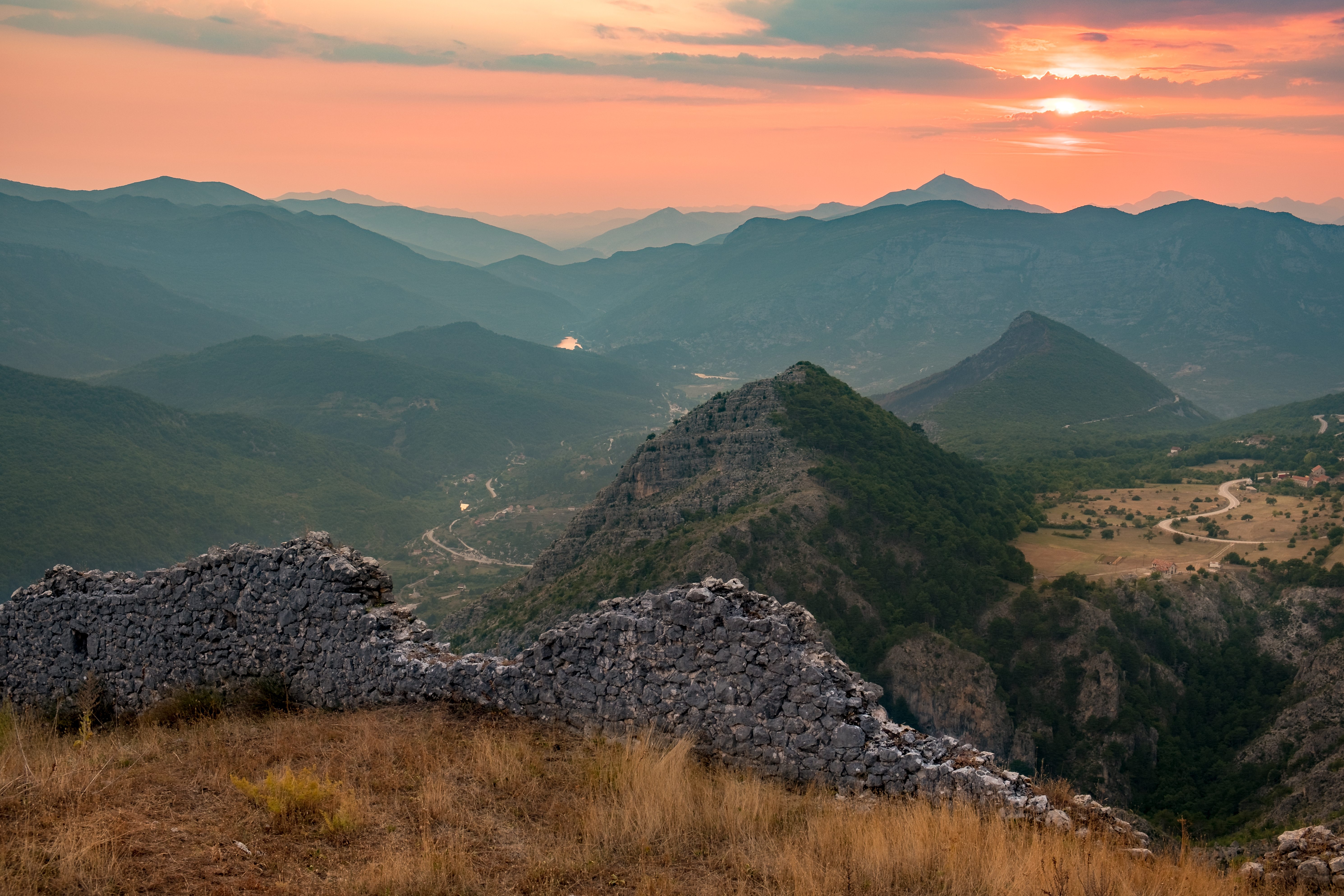 This image was uploaded as part of Trace of Soul 2018. Zidine starog grada Klobuk u blizini Trebinja. Pogled ka Trebinju.